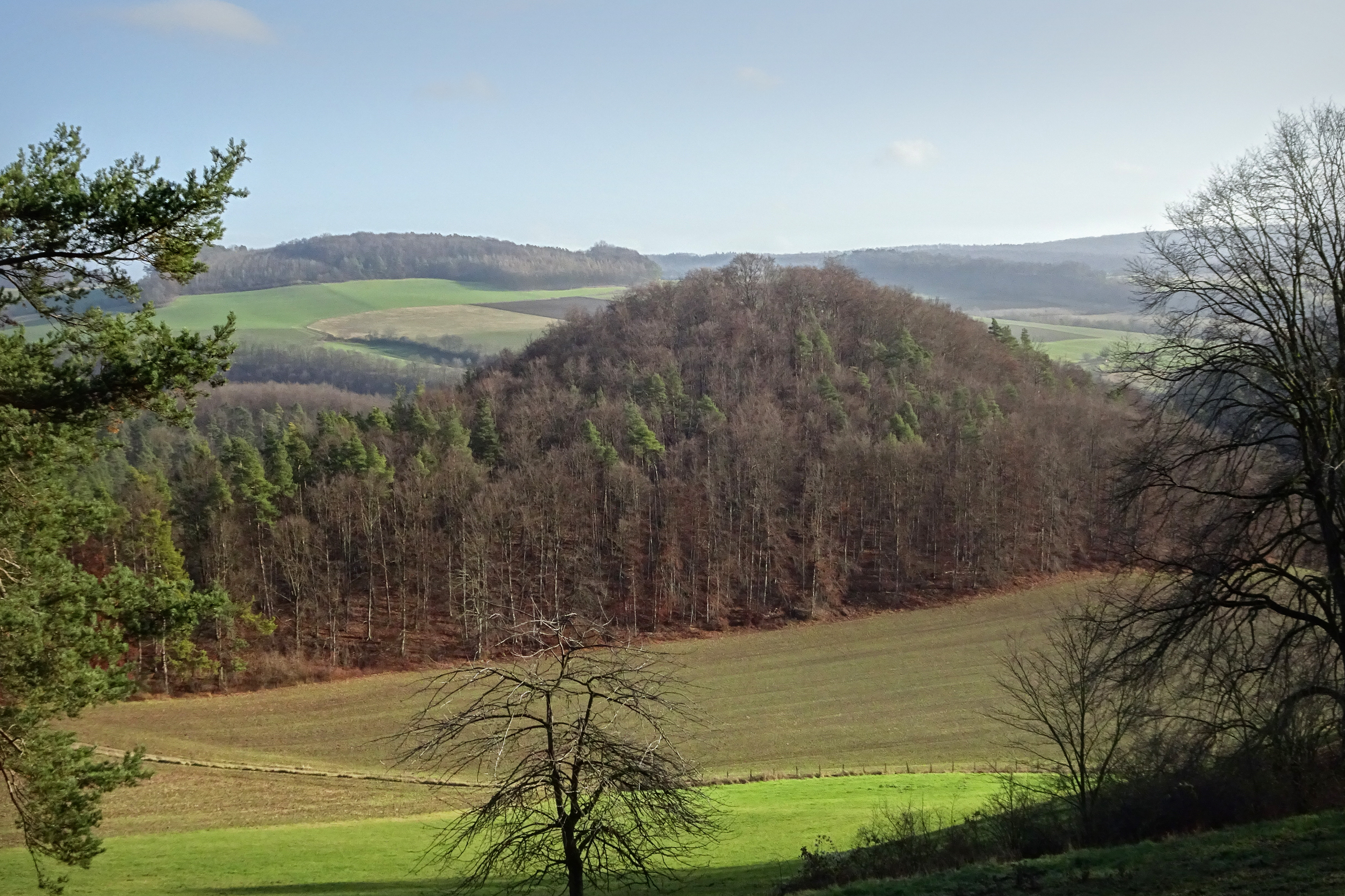 Der „Taubenberg“ liegt mit einer Höhe von 340 m im mittleren Ulfetal, in der Gemarkung von Breitau, einem Ortsteil Sontras, im nordhessischen Werra-Meißner-Kreis. Auf seiner Kuppe finden sich Überreste einer langgestreckten, rechteckigen Burganlage, von der heute nur noch verflachte Wälle und Gräben erhalten sind. Die dort geborgenen Keramikscherben werden in das 12. und 13. Jahrhundert datiert. Über die Erbauer und die Entstehungszeit ist nichts bekannt, es fehlen jegliche zeitgenössischen Zeugnisse.